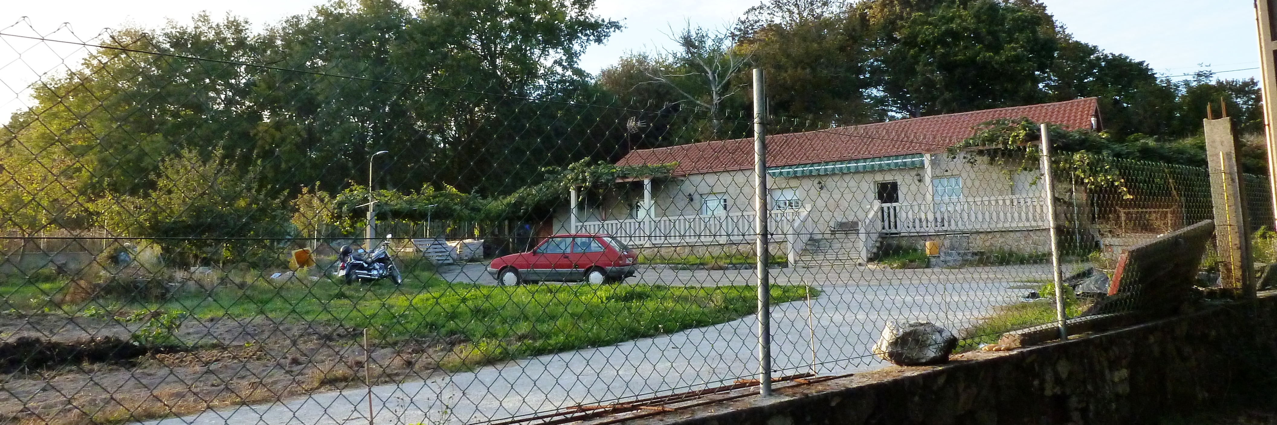 Vilar de Mulleres, Lobelle, Carballedo